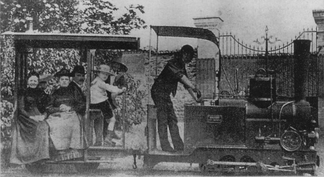 Lucien Chanuc 'Ces étonnants véhicules à vapeur' aux éditions de l'Ormet. Locomotive à vapeur : locomotive-tender, à voie inférieure à 1 mètre, 020 T Marius Patay, dite Colibri. Marius Patay travaillait à Lyon dans un atelier de mécanique et mit au point en 1887, un tricycle à vapeur de 700 kilos dont il avait obtenu l'autorisation d'essai En février 1888, entre la Guillotière et Vénissieux.plus tard celui-ci sera transformé en locomotive surnommée le colibri. (aucune indication sur son usage ultérieur...Peut-être dans l'usine PATAY, cycles et moteurs électriques?)